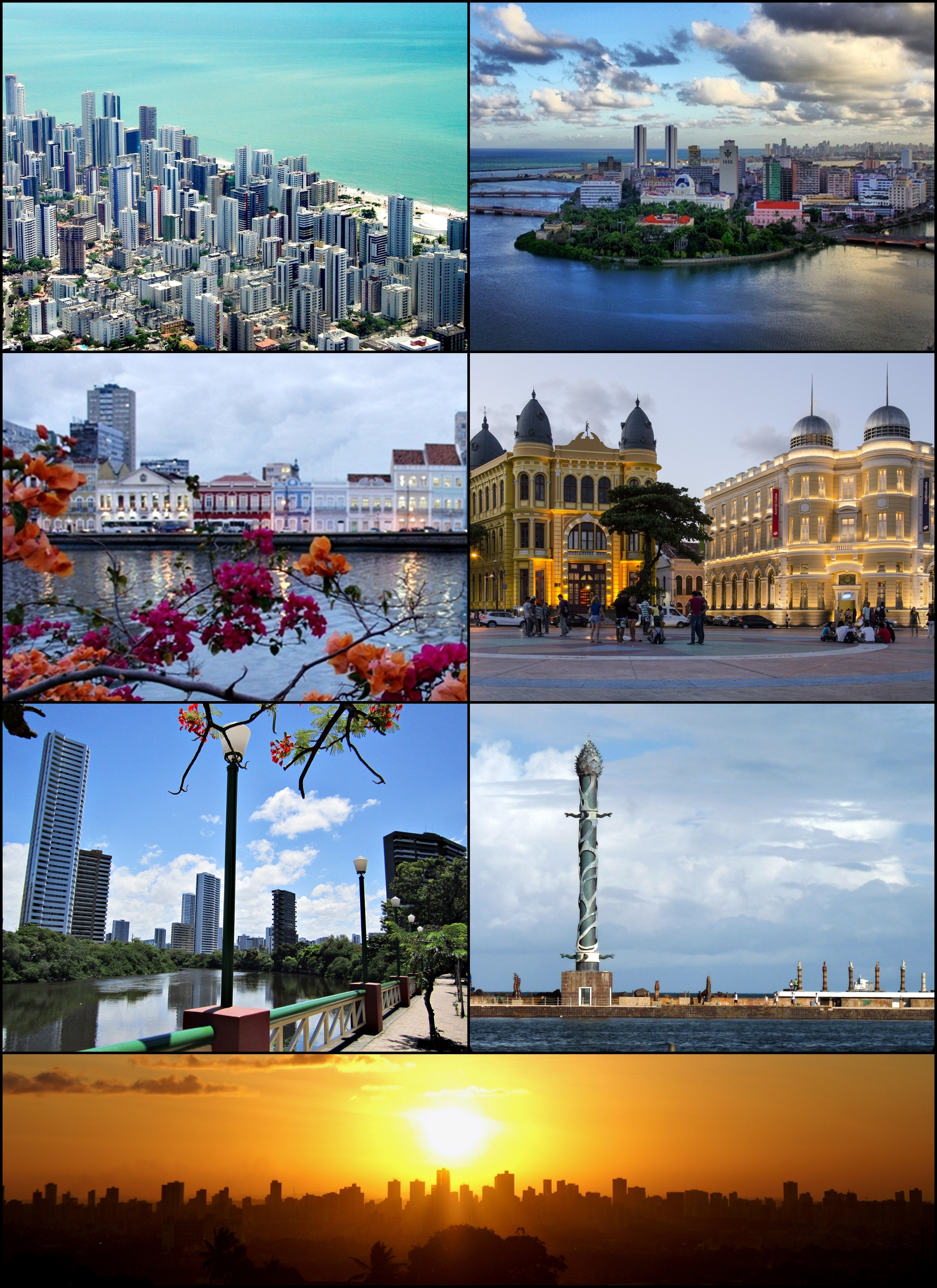 Do topo, em sentido horário: vista aérea do bairro de Boa Viagem; Ilha de Antônio Vaz e pontes do Centro do Recife; Marco Zero; "Torre de Cristal" no Parque das Esculturas Francisco Brennand; pôr do Sol com um panorama da cidade; Rio Capibaribe e o bairro da Jaqueira; e Rua da Aurora.